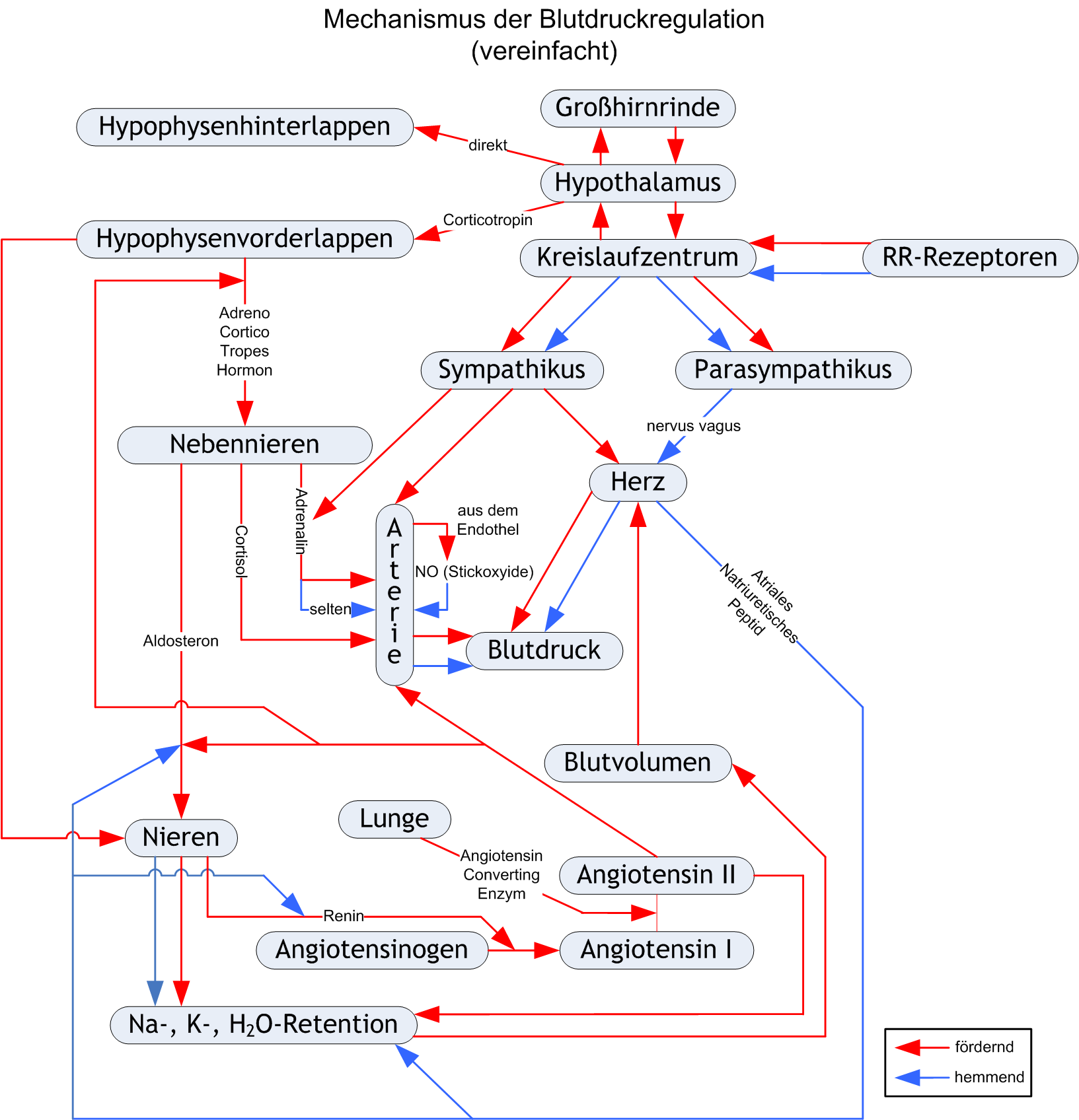 Mechanismus der Blutdruckregulation